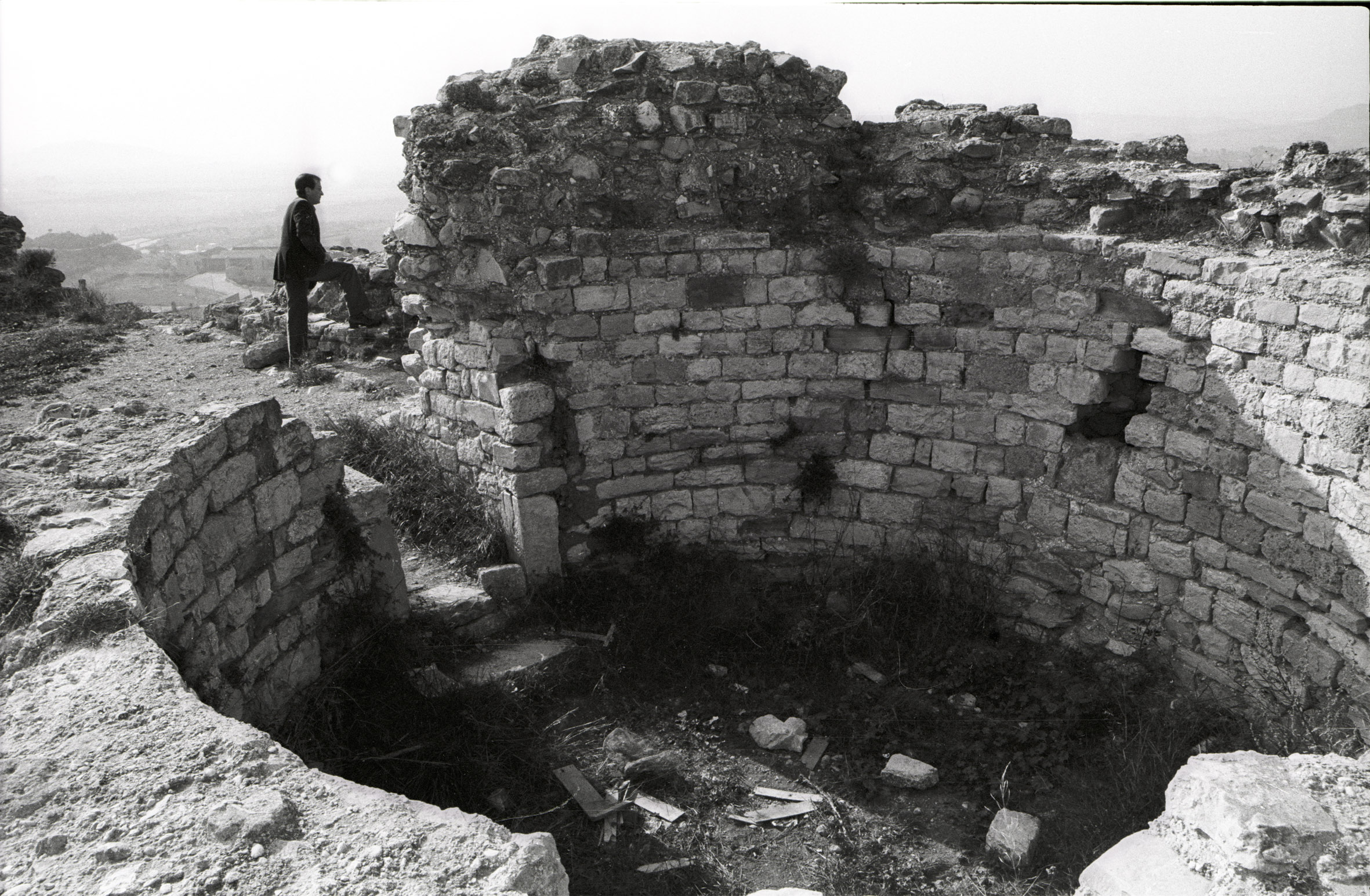 José Agustín Goytisolo al castell de Barberà, 1984. La intervenció del poeta fou fondamental per a la recuperació del castell.